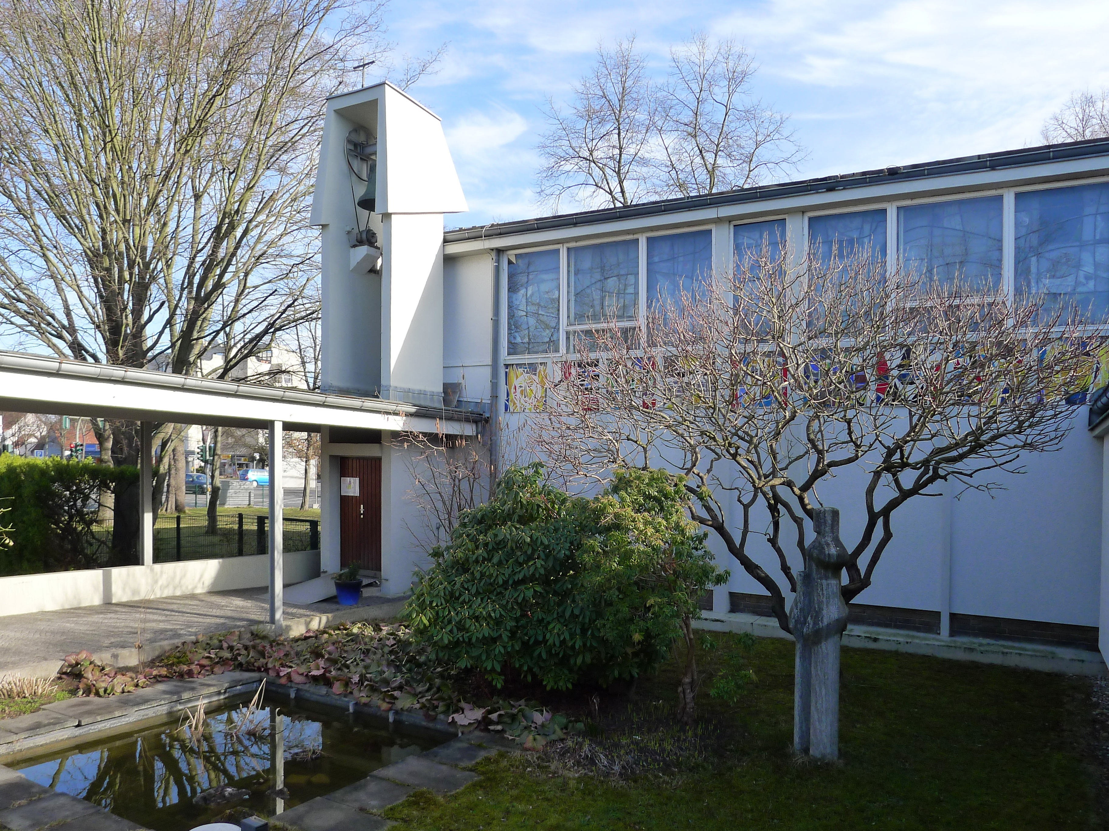 Eingangsbereich im Campanile